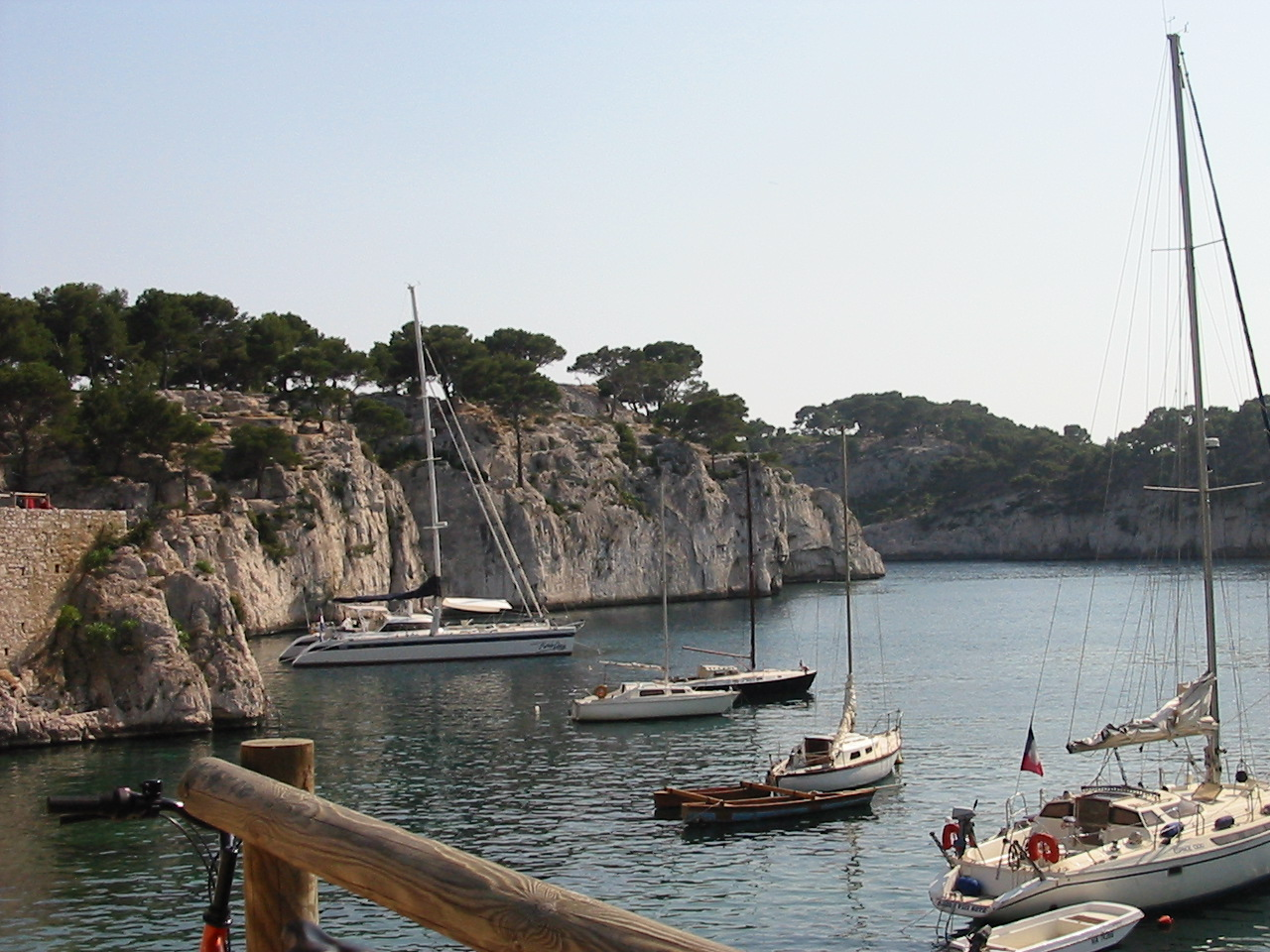 Calanque de Port-Miou (Bouches-du-Rhône, France)